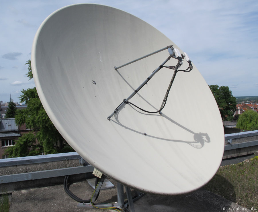 Antenne parabolique de secours CityPlay Amiens (2)